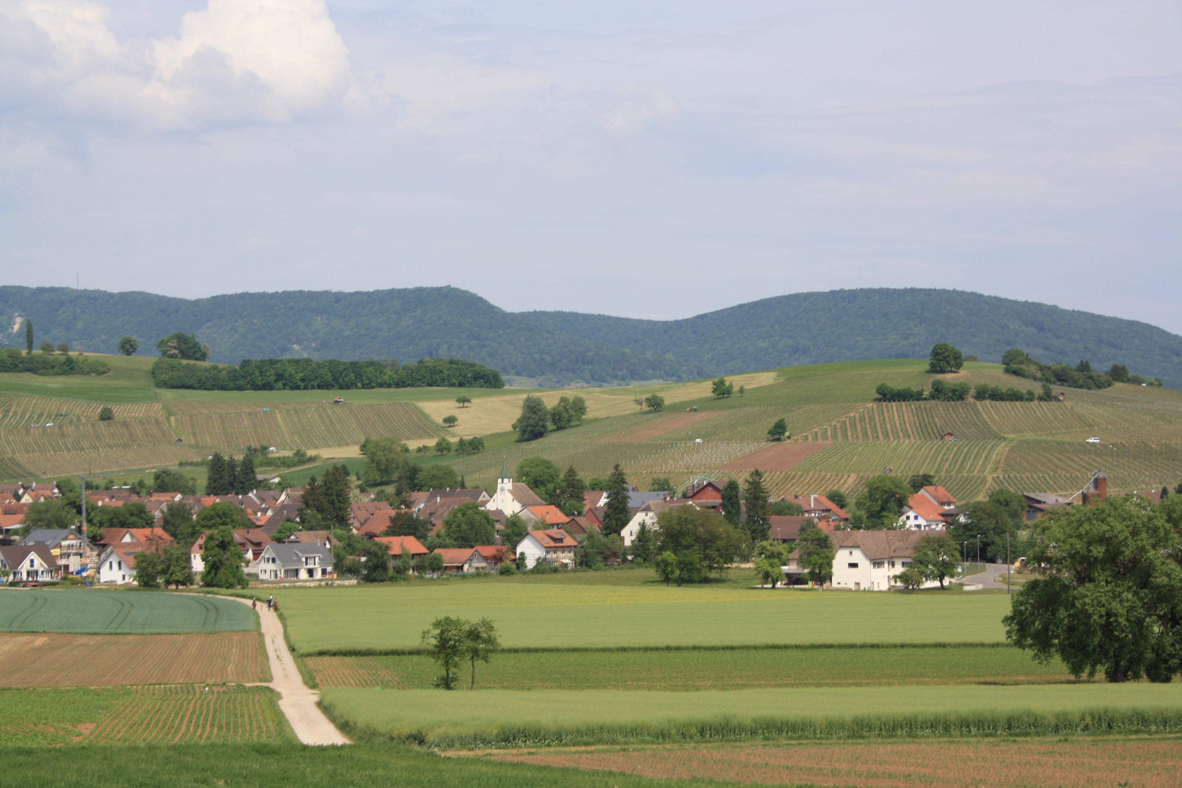 Blick von Hallau auf Oberhallau